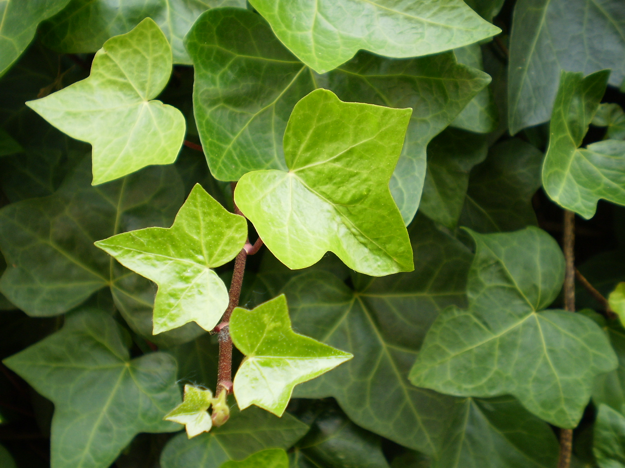 Hojas de rama no florífera de Hedera helix